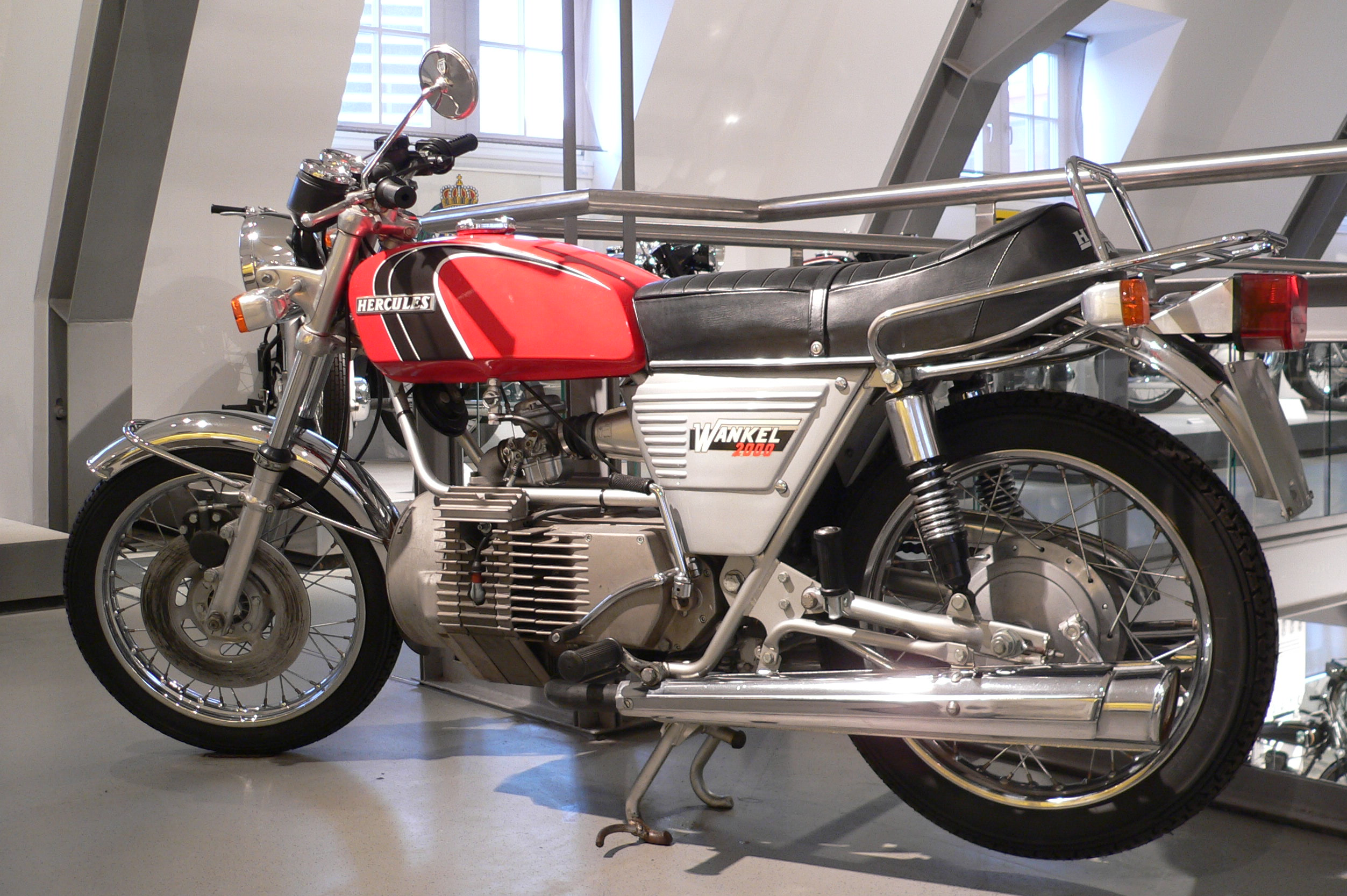 Motorbike "Hercules Wankel 2000" (1975) at the Deutsches Zweirad- und NSU-Museum (294 cm³, Einscheiben-Kreiskolben-Motor, 26 PS bei 6.500 U/min., 140 km/h)